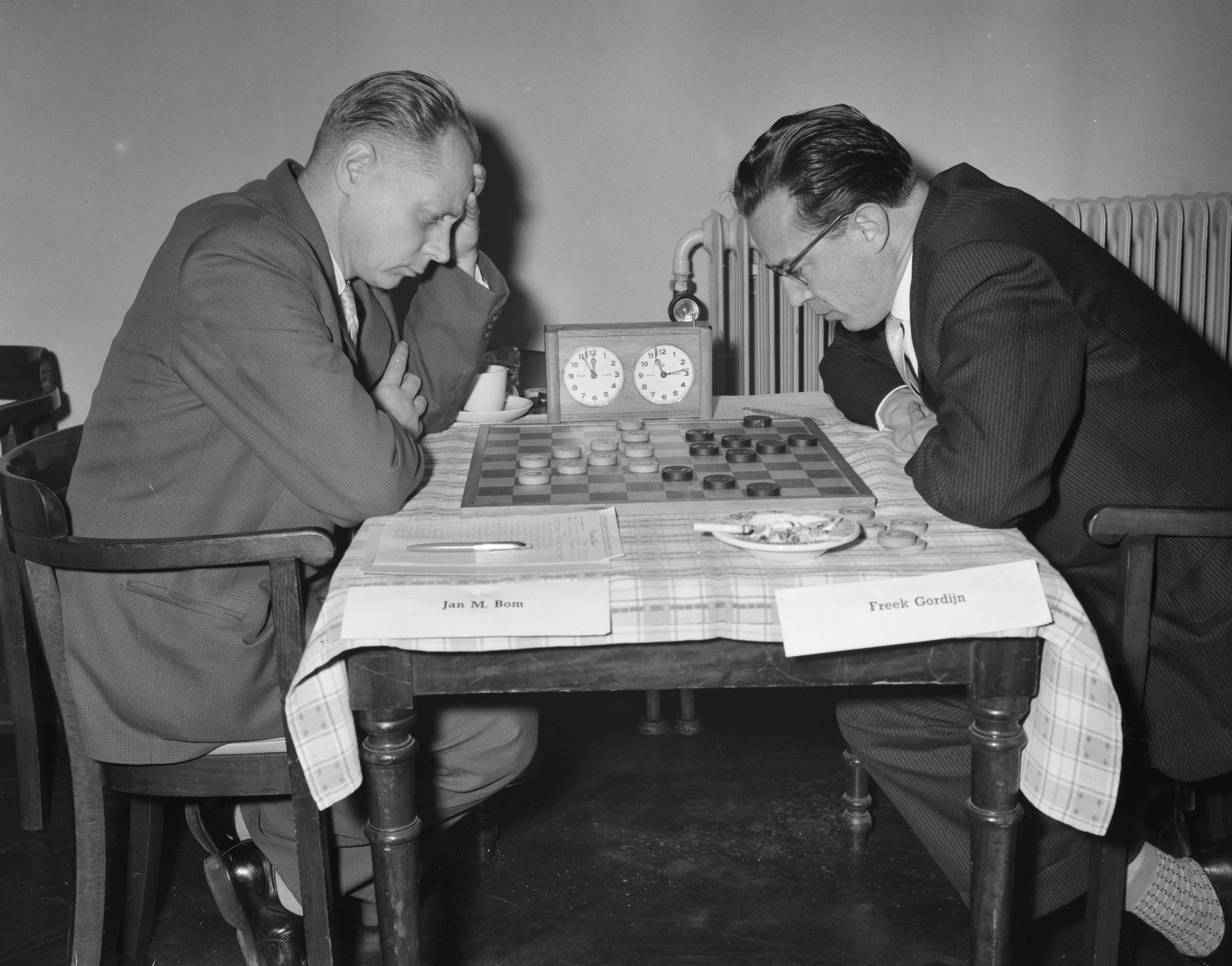 Internationaal damtoernooi in Krasnapolski, Jan M.-Bom tegen Freek Gordijn (r)